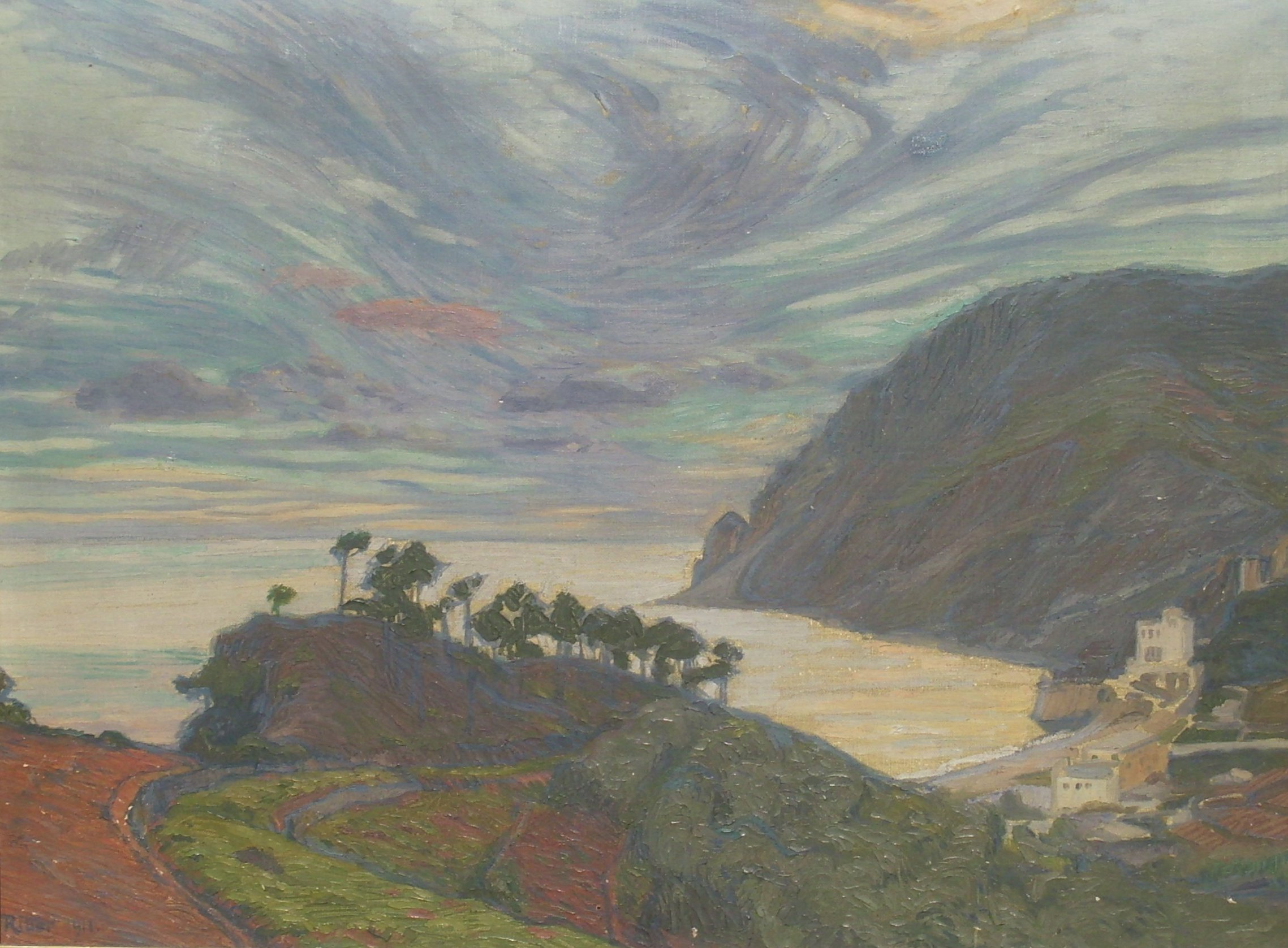 Monterosso